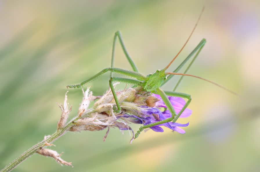 Дыбка степная